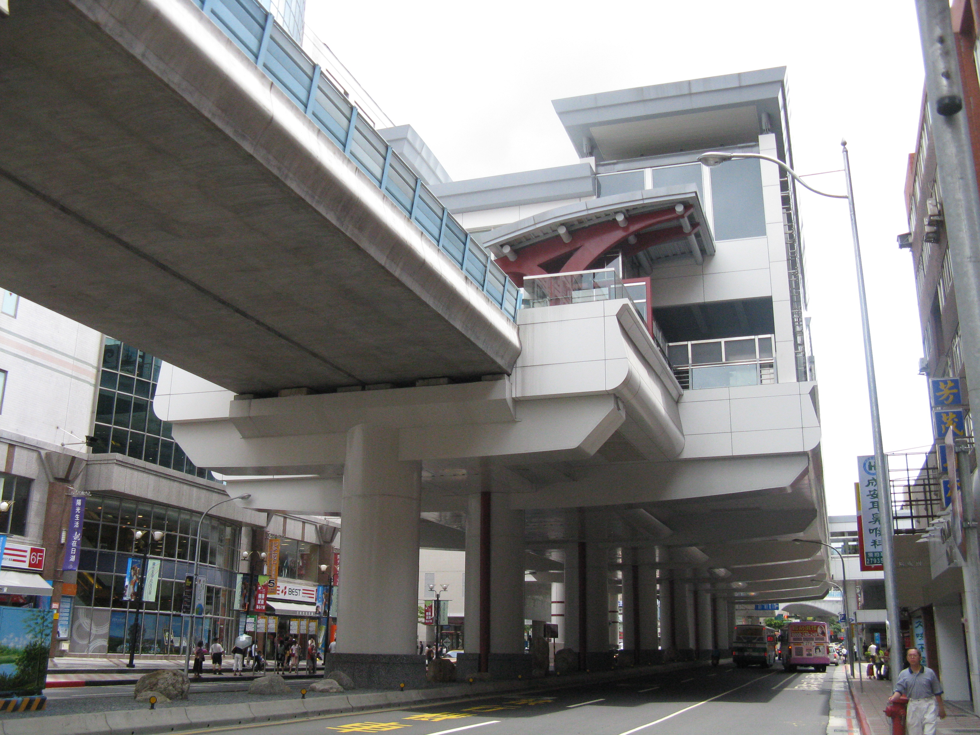 台北捷運内湖線内湖駅の駅舍近観。